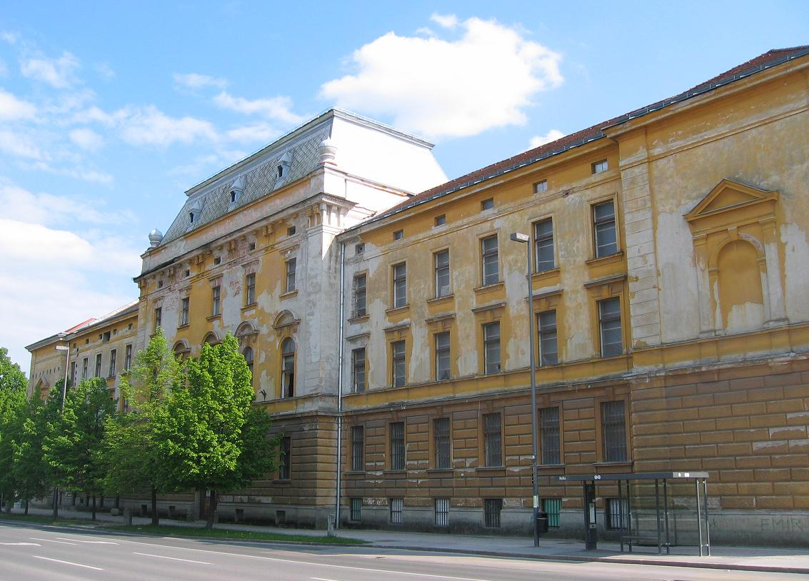 Domobranska Vojašnica, Ljubljana photo:Ziga 20:49, 8 May 2006 (UTC)